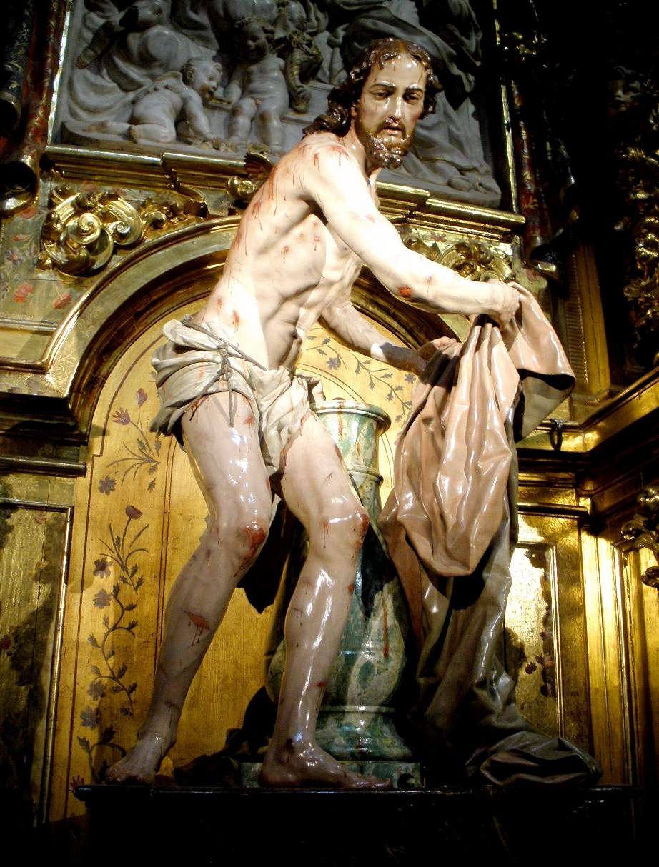 Clerecía de San Marcos (Colegio Real de la Compañía de Jesús), en Salamanca. Cristo recogiendo sus vestiduras.